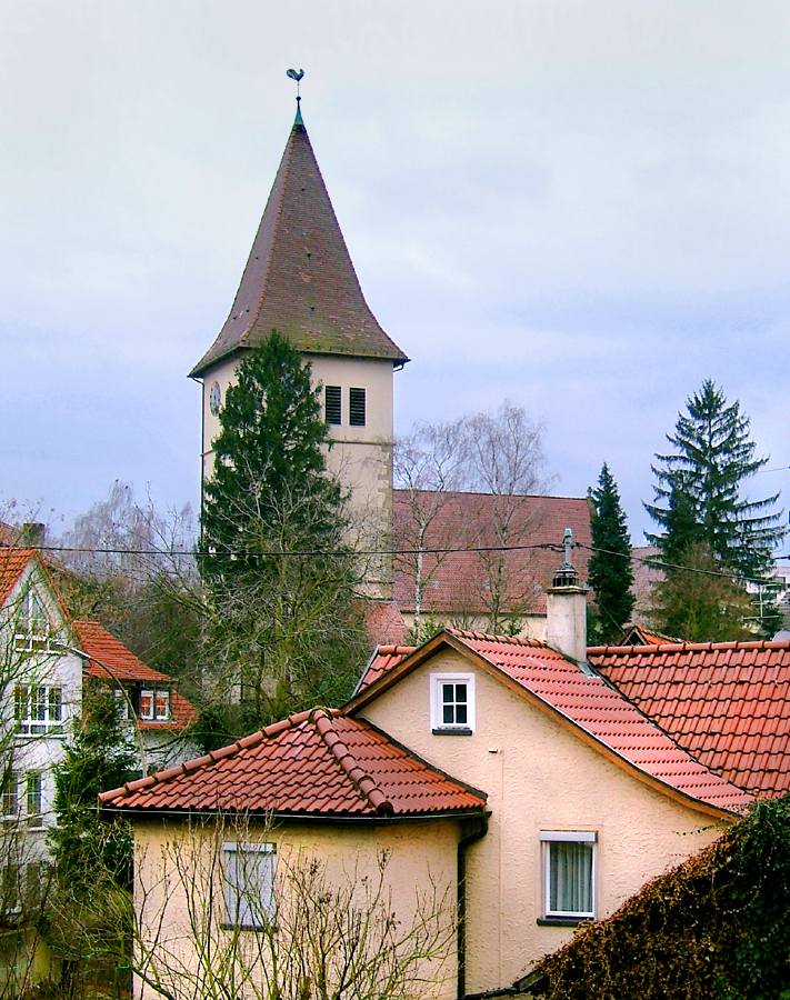 ev. Kirche in Weinstadt-Endersbach, Baden Württemberg, Deutschland